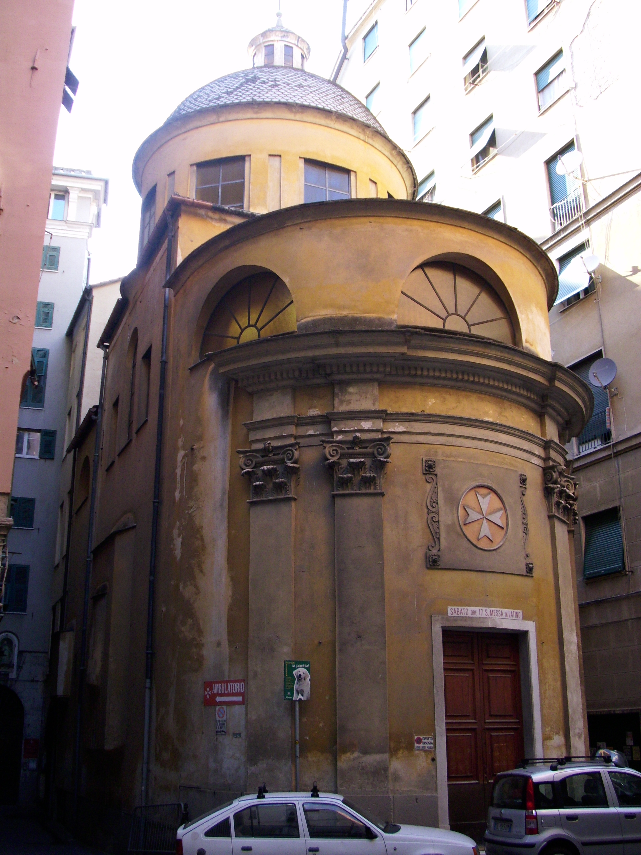 Chiesa di San Pancrazio a Genova. La chiesa è sede della delegazione ligure del Sovrano Militare Ordine di Malta.